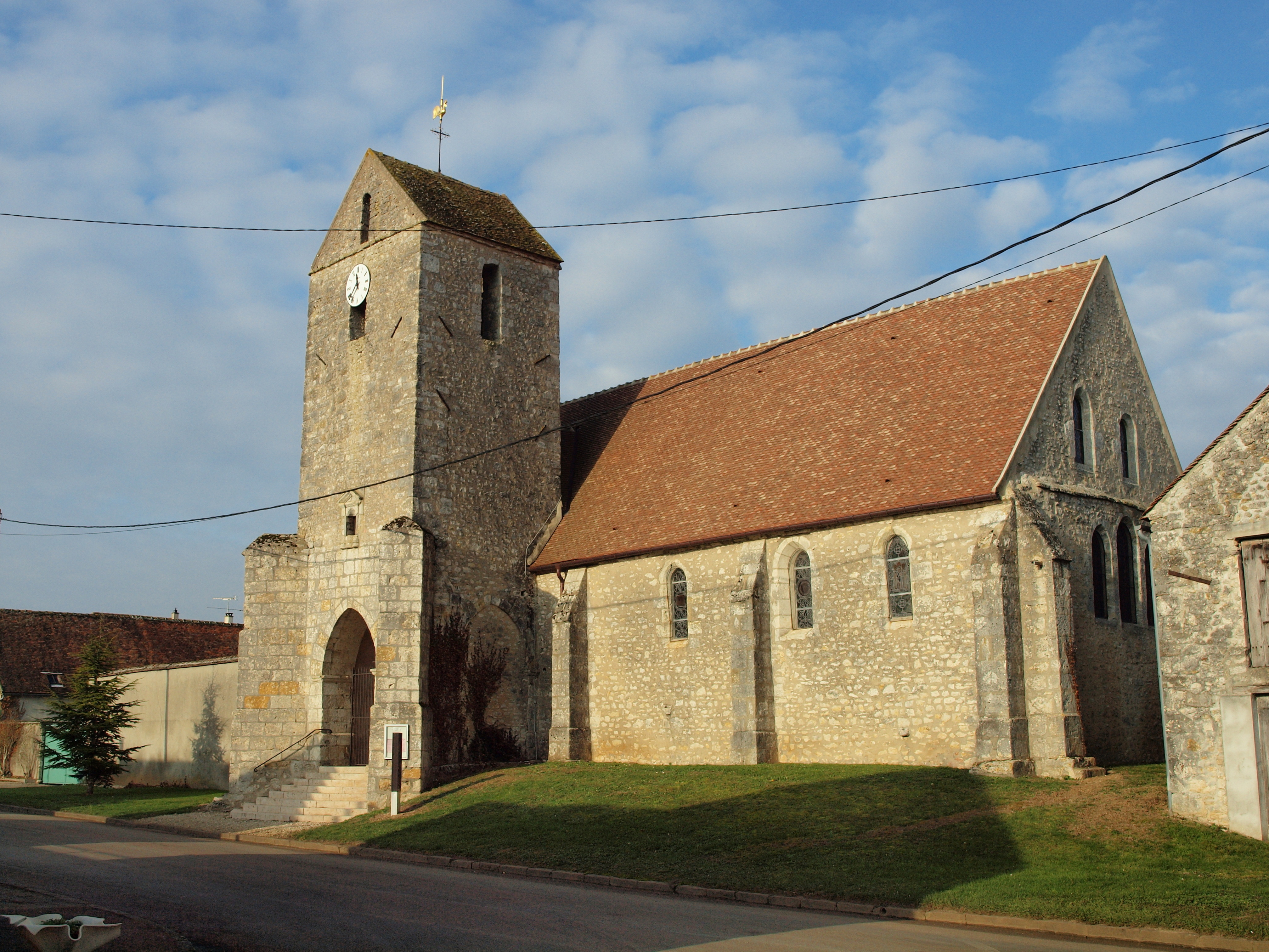 Église Saint-Martin de Garentreville (Seine-et-Marne, France)